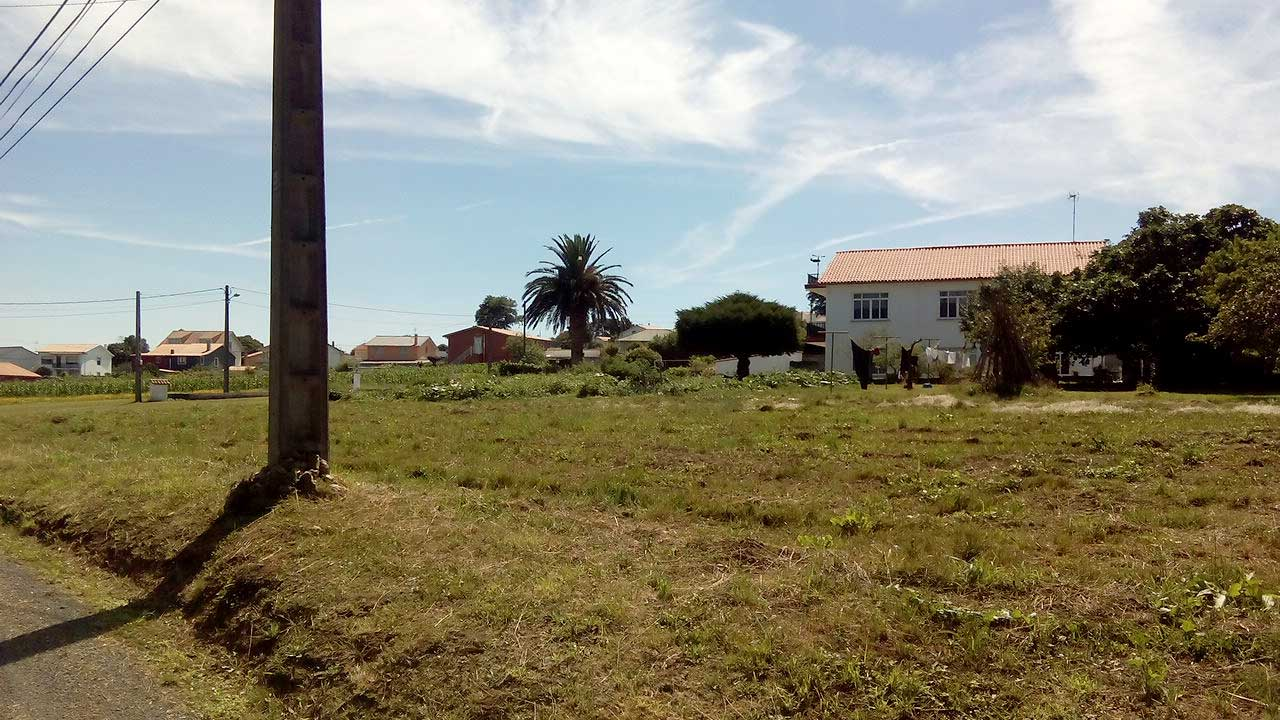 Vista da Cavada, O Val.